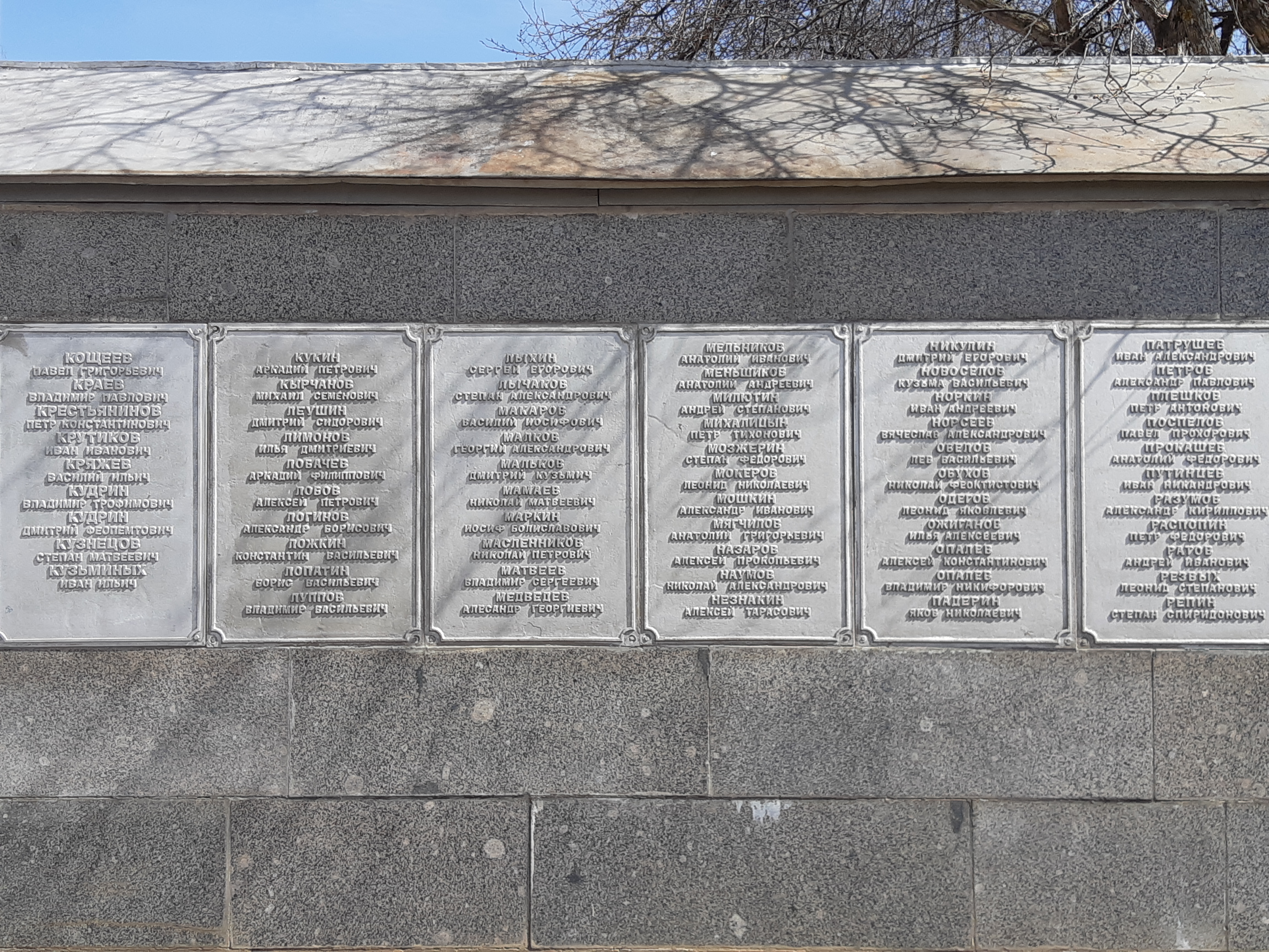 Вятские Герои (К-Р) на мемориальной доске в парке дворца пионеров. Киров 2019.